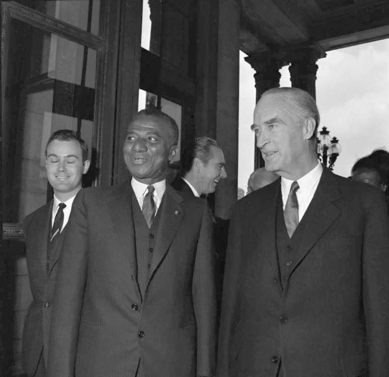 Staatspräsident von Togo, Olympio, zu Besuch bei der Firma Krupp, Essen, Villa Hügel